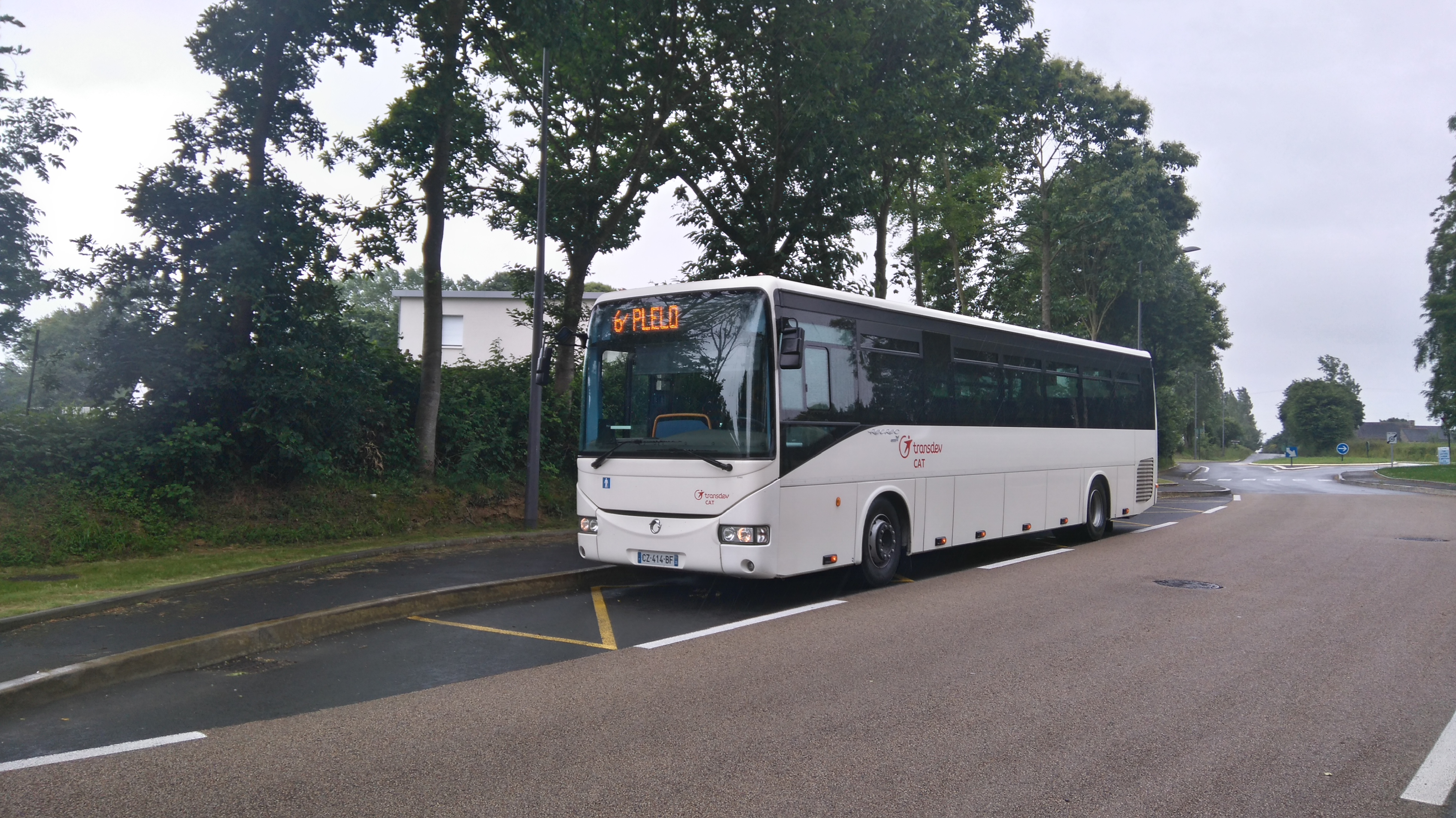 Un Irisbus Récréo sur le réseau Ti'Bus en renfort de la ligne 6 à l'arret Plélo.